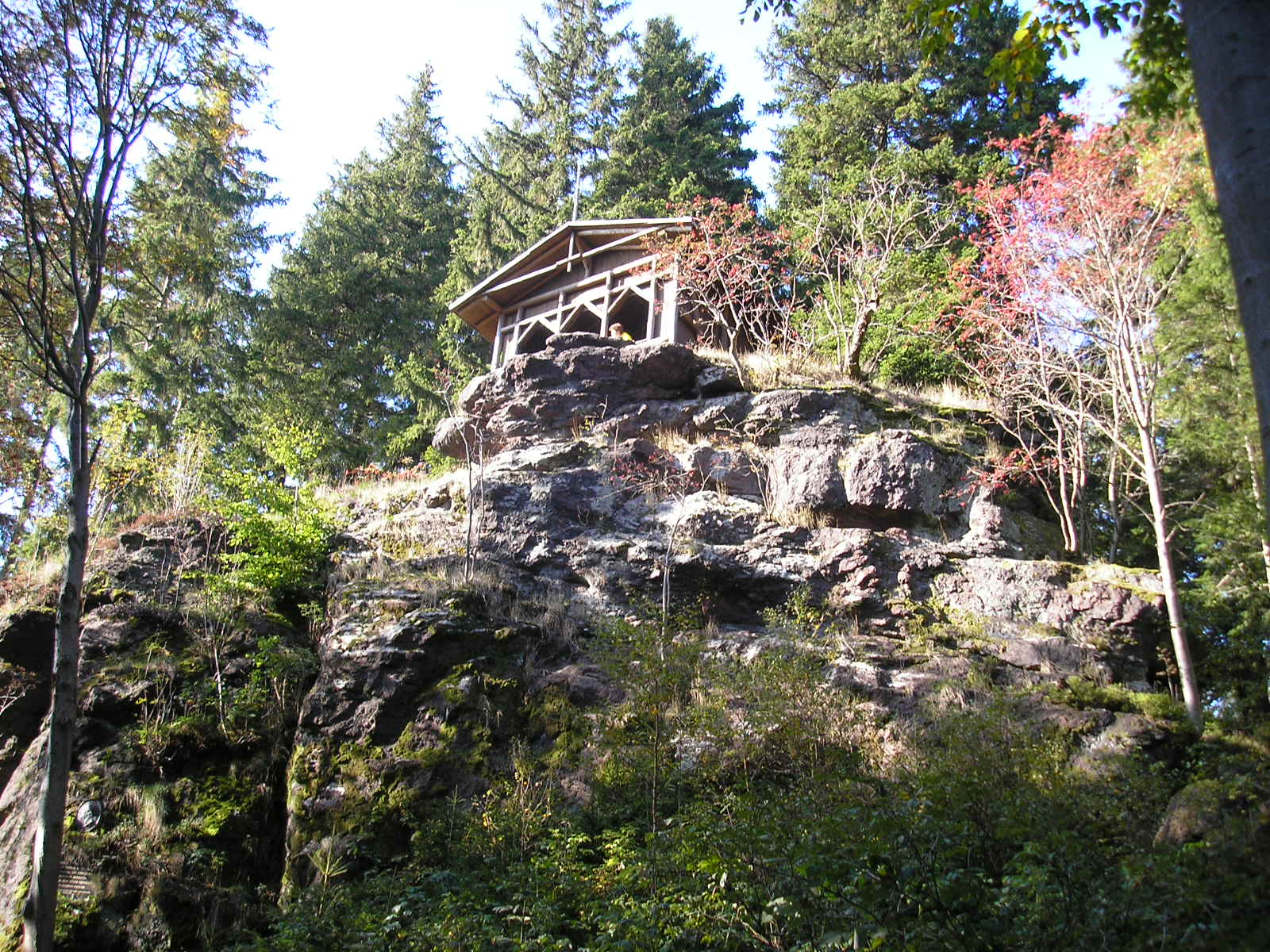 Der Porphyrfelsen "Schwalbenstein" bei Ilmenau (Thüringen).